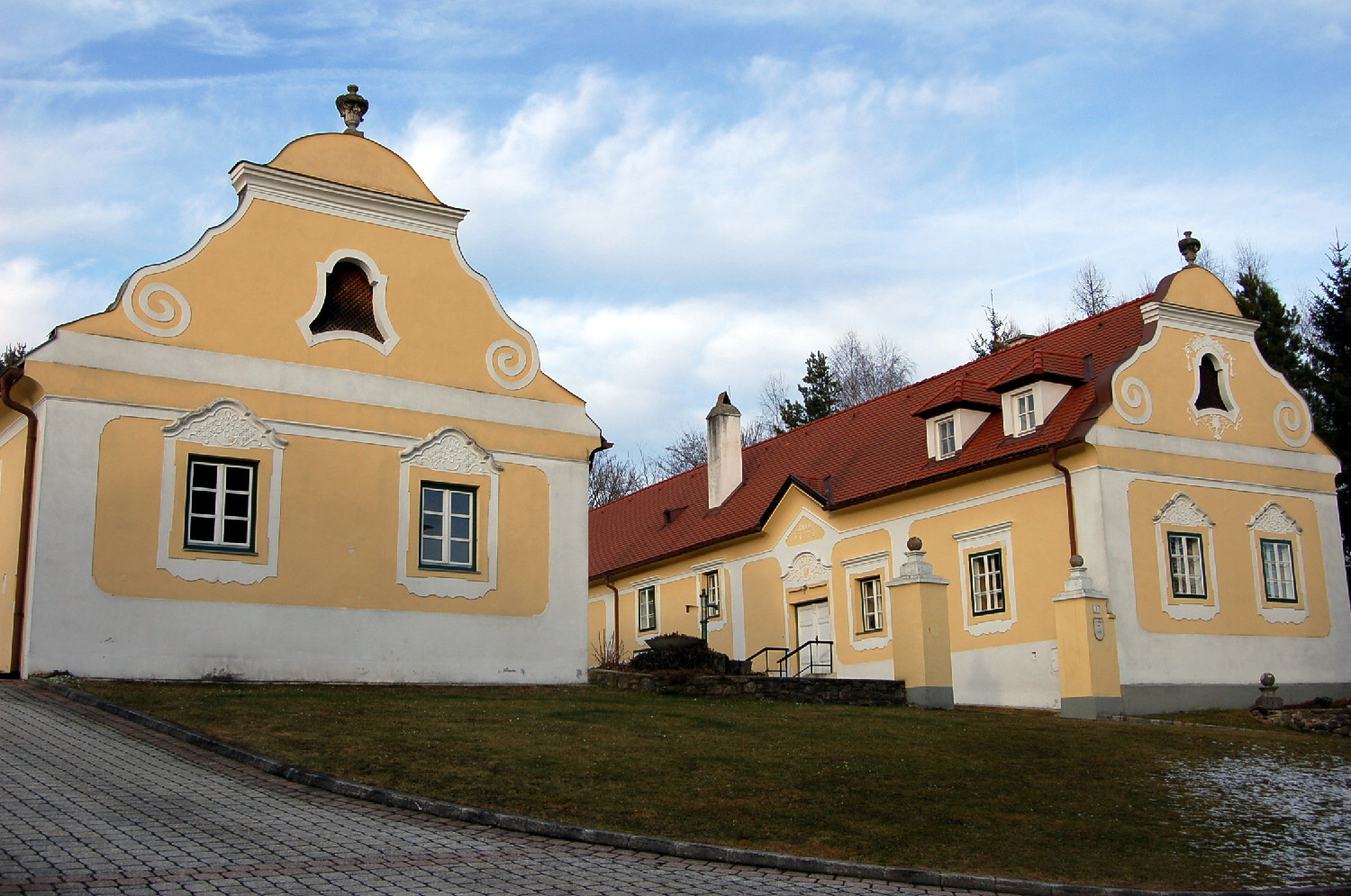 Rokoko-Pfarrhof von Krumbach in der Buckligen Welt